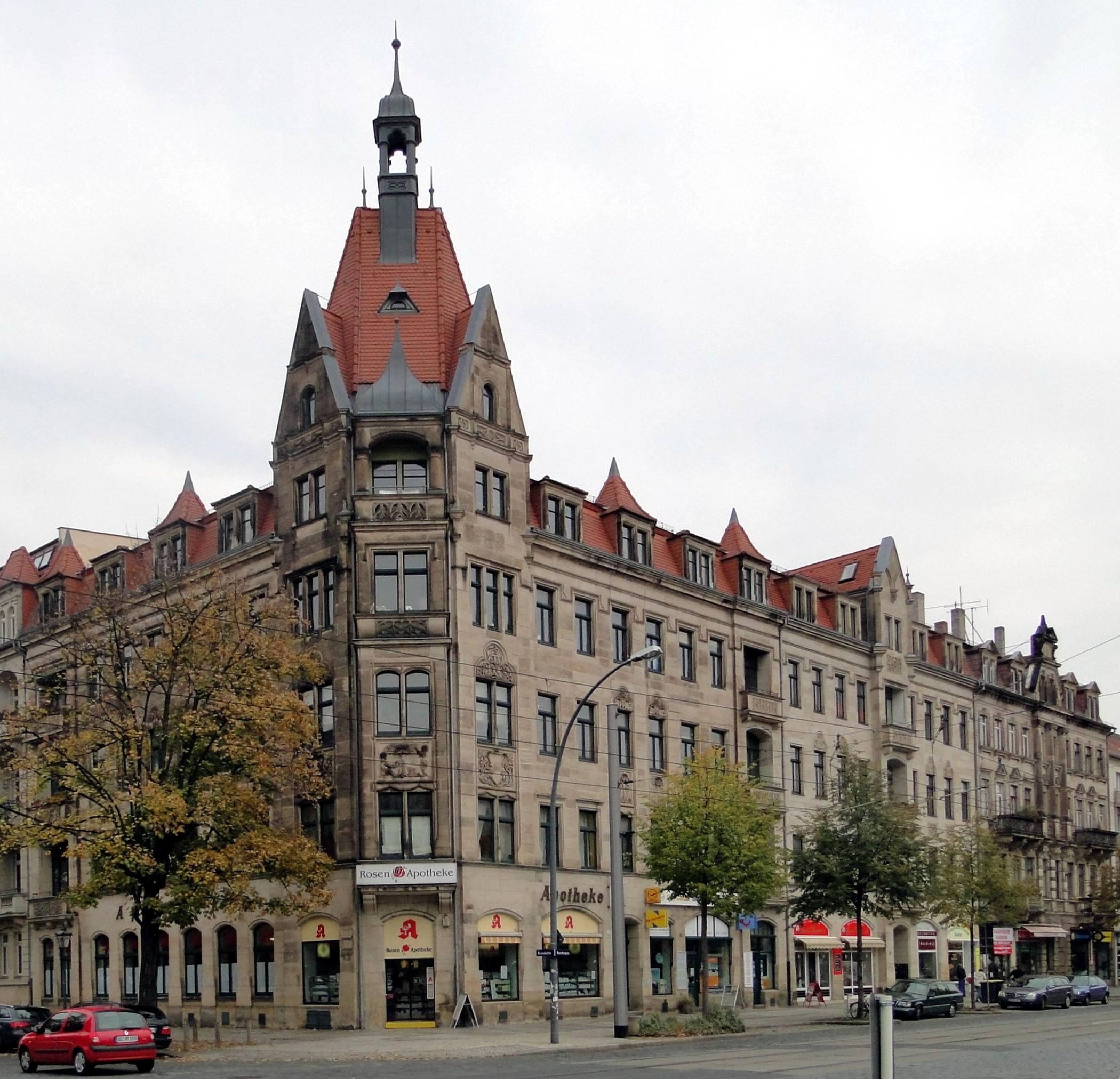 Häuser Borsbergstraße 19, 19 b und 21 auf der Borsbergstraße in Dresden